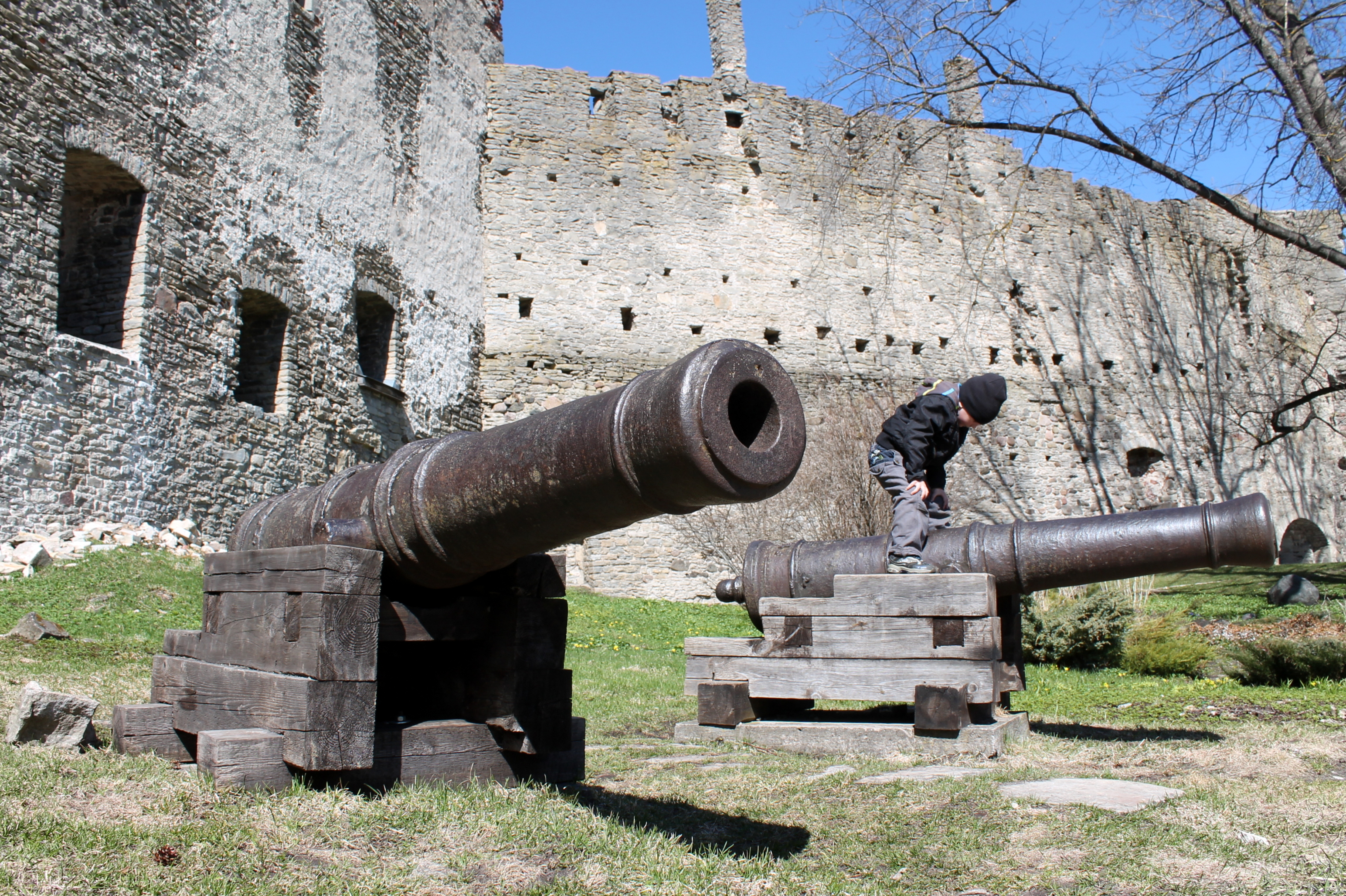 Haapsalu linnuse varemed ja vallikraav